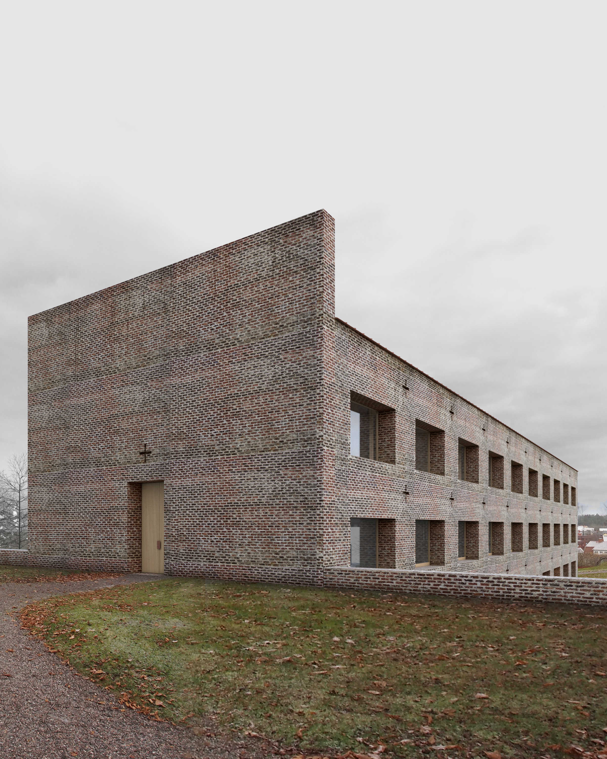 Visualisering, tävlingsförslag, Strängnäs Domkyrka